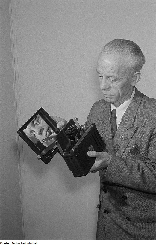 Original image description from the Deutsche Fotothek Eine Person präsentiert ein Exponat des VEB Gerätewerk Friedrichshagen auf der Leipziger Herbstmesse 1954